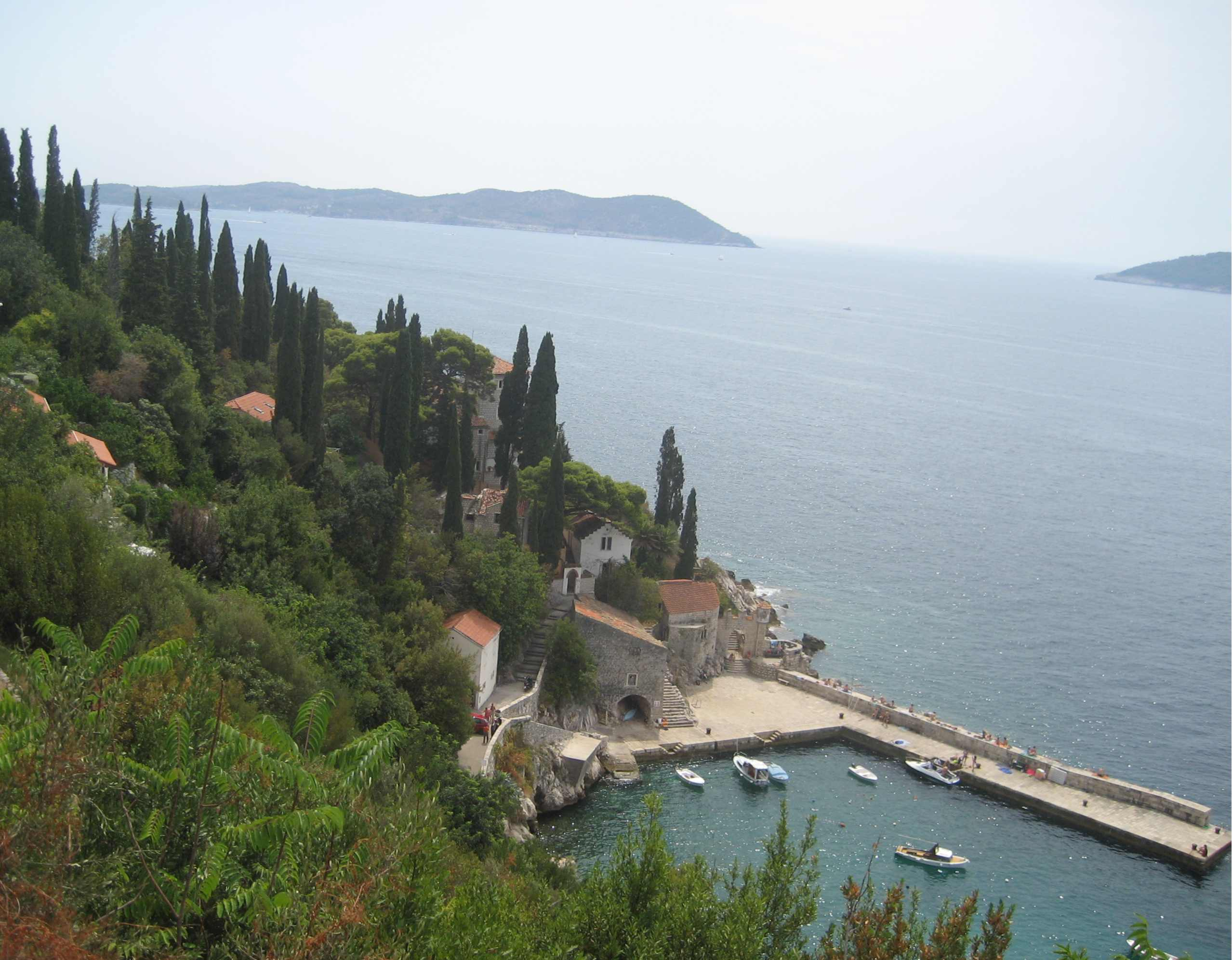 Trsteno, near Dubrovnik, Croatia